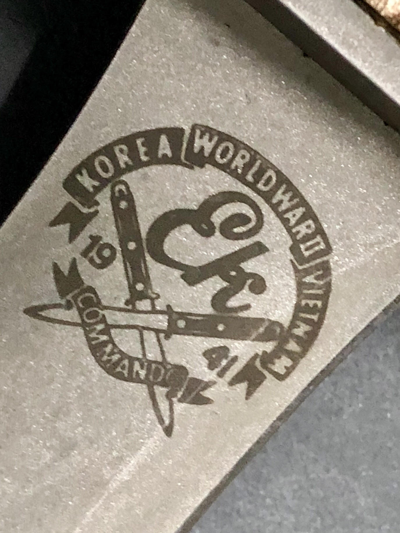 ek knife symbol